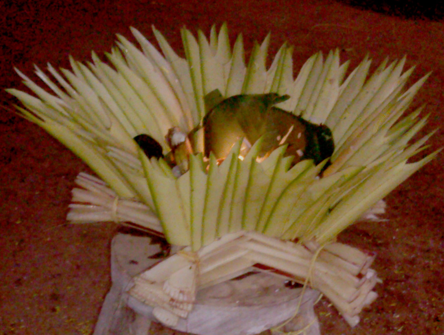 ಕನ್ನಡ: ಬಲಿ 1